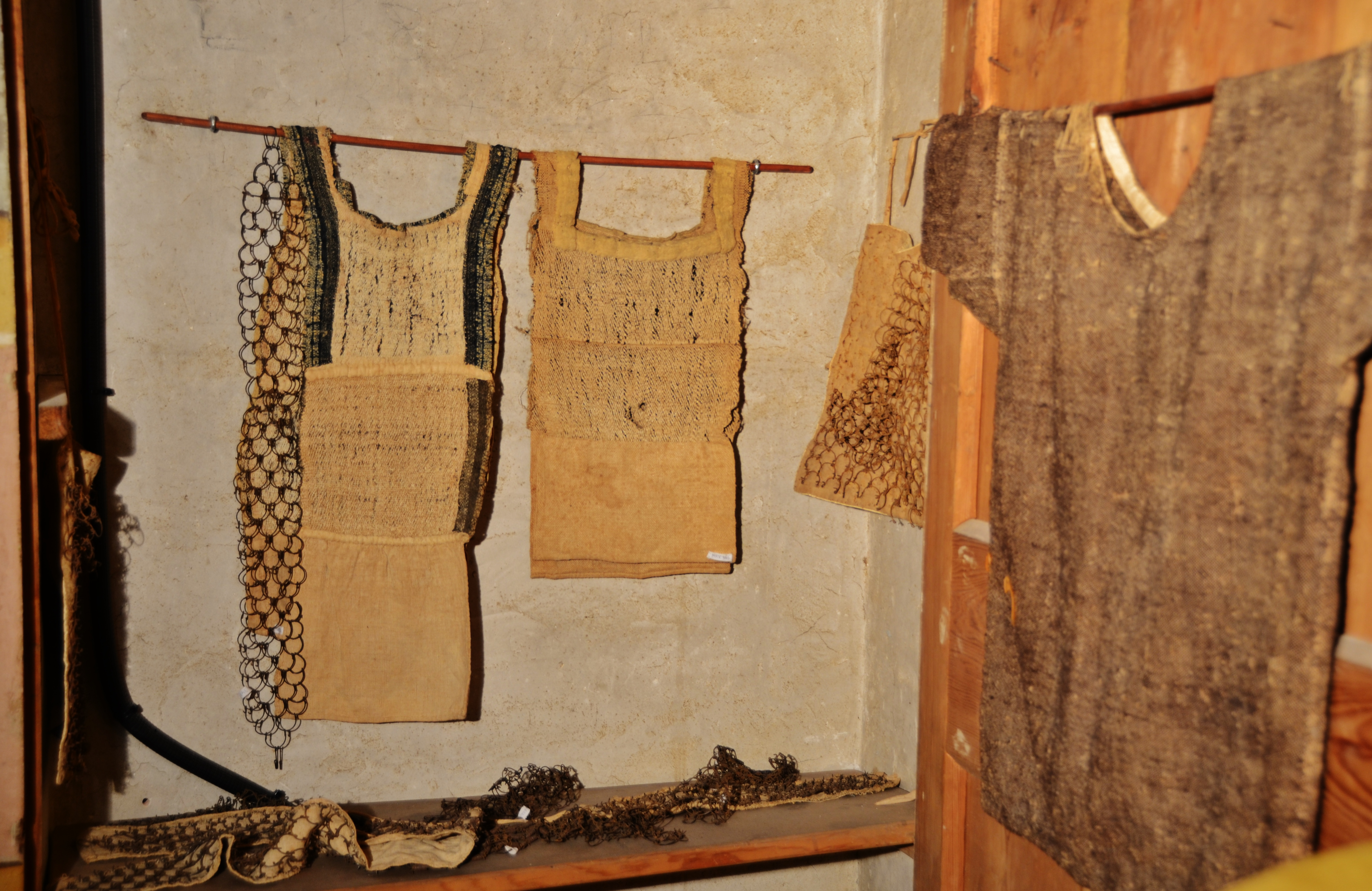 Interior de l'habitació principal Imperi del Museu Romàntic Can Papiol, Vilanova i la Geltrú (Catalonia).